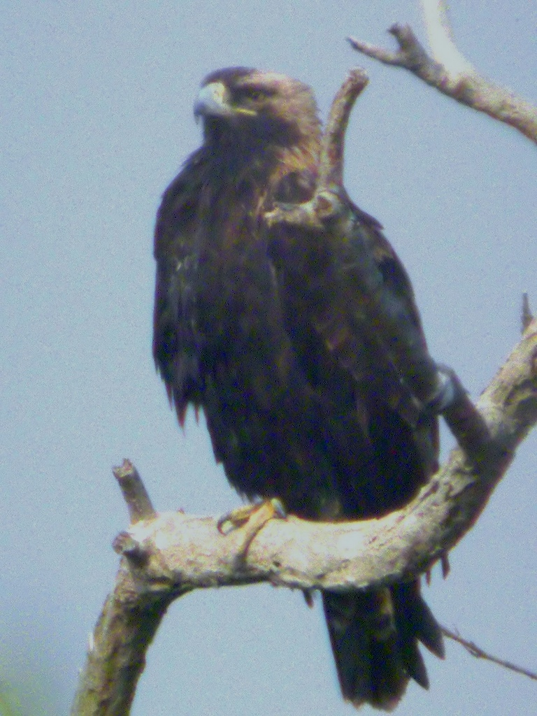 Aquila heliaca, Hong Kong